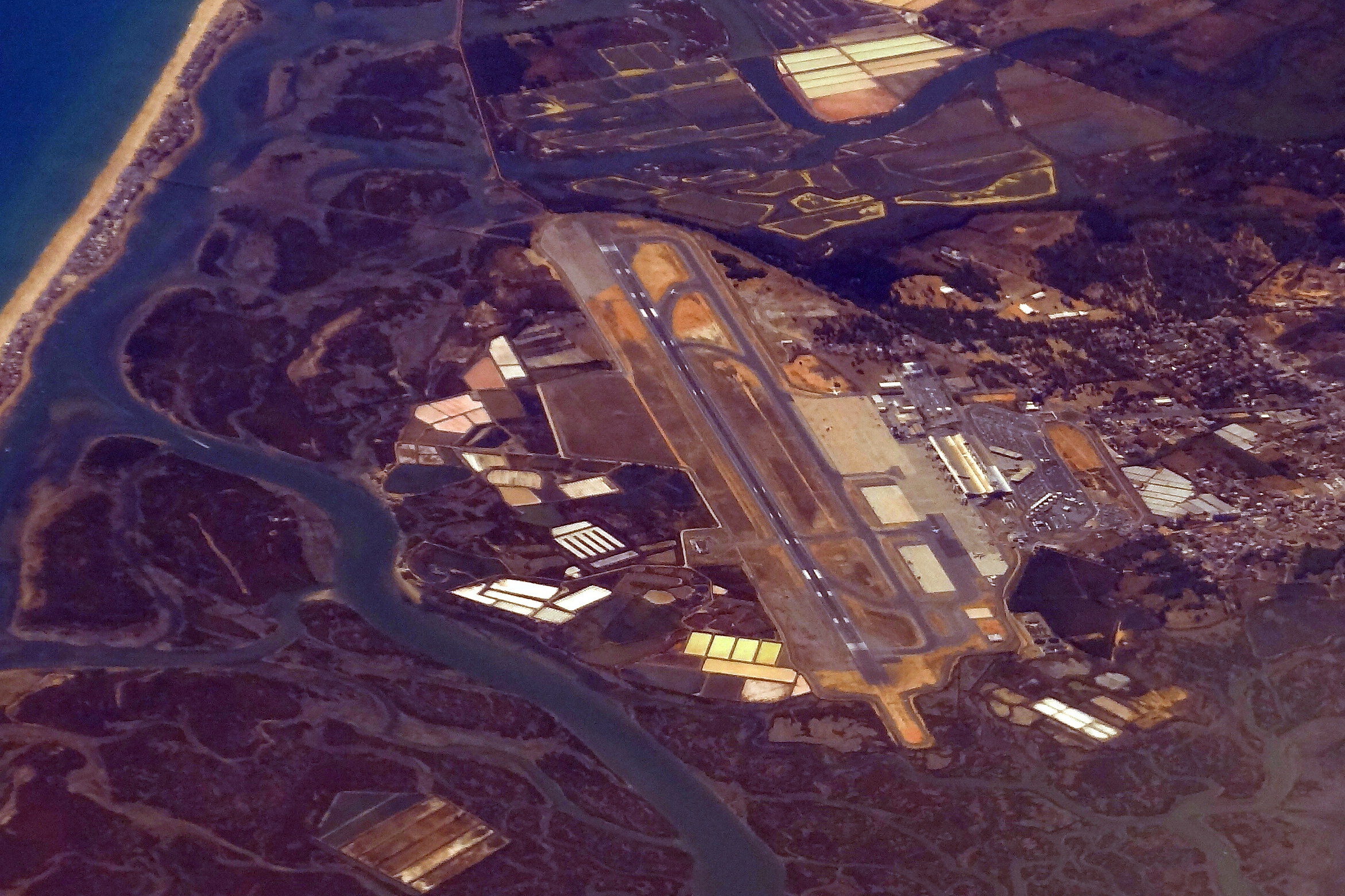 FAO FARO AIRPORT PORTUGAL FROM FLIGHT CDG-RAK EASYJET G-EFZI A319